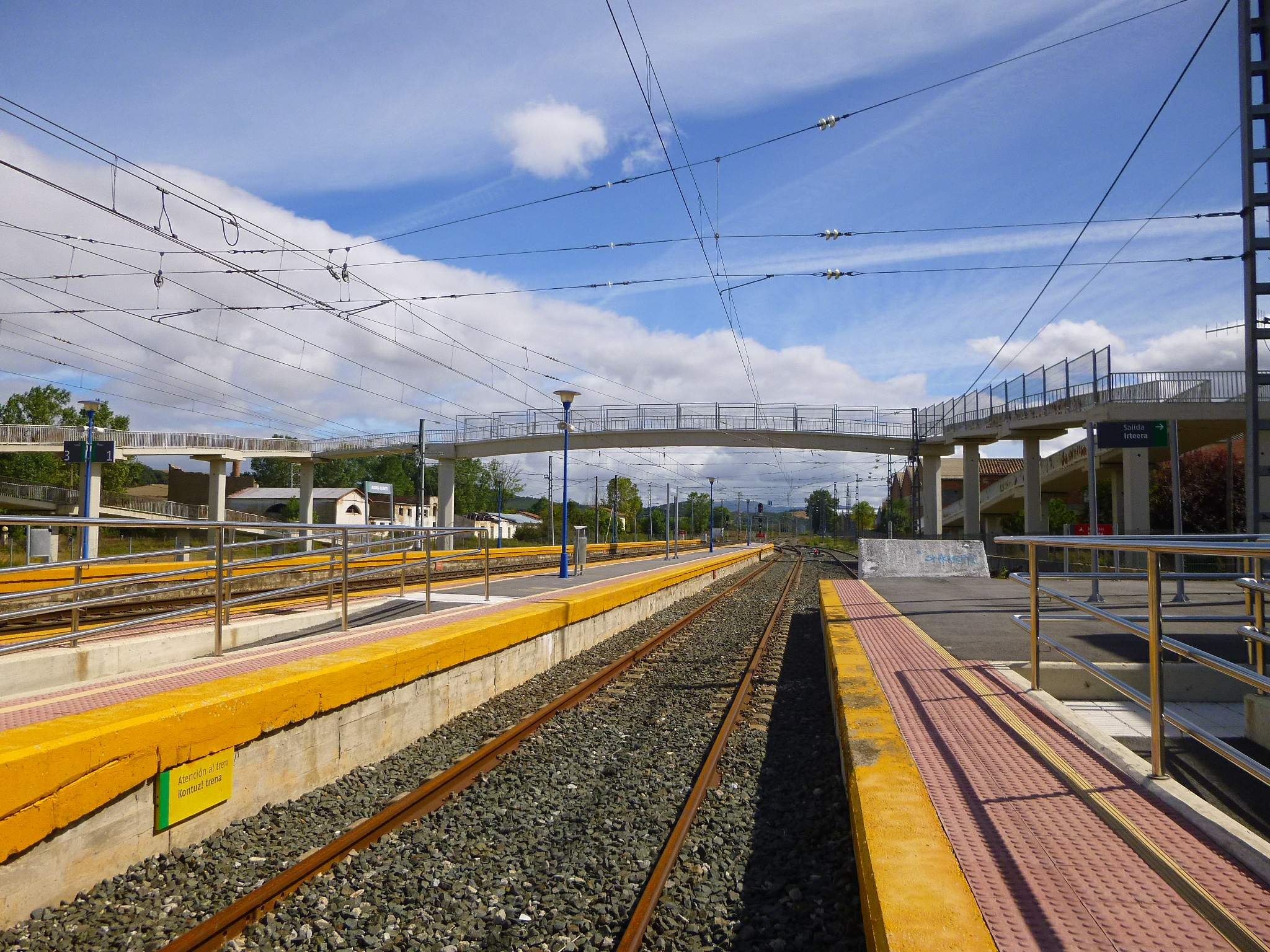 Estación de tren de Alegría-Dulantzi (Álava).